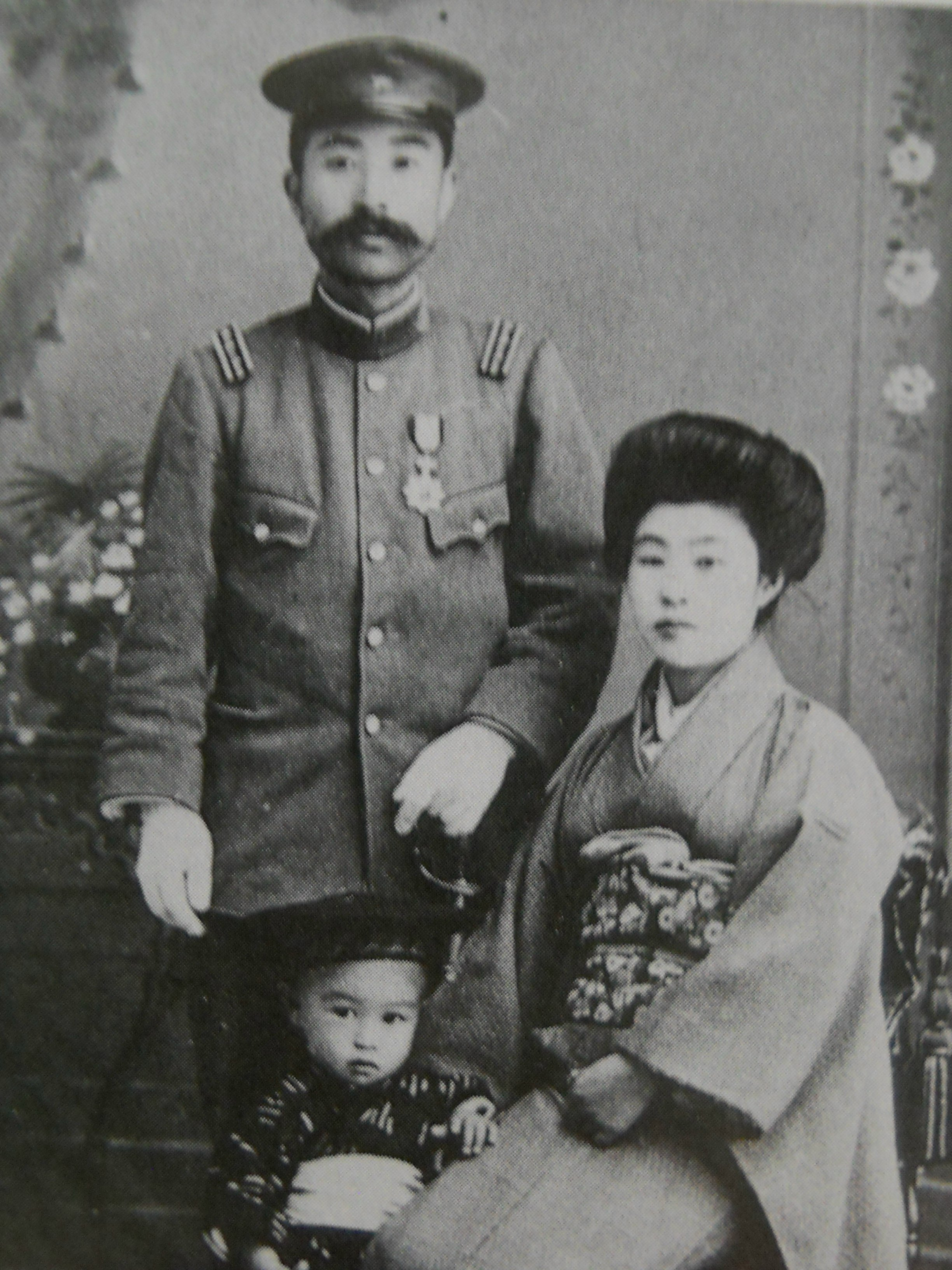 Nakahara Tyuuya and Parents